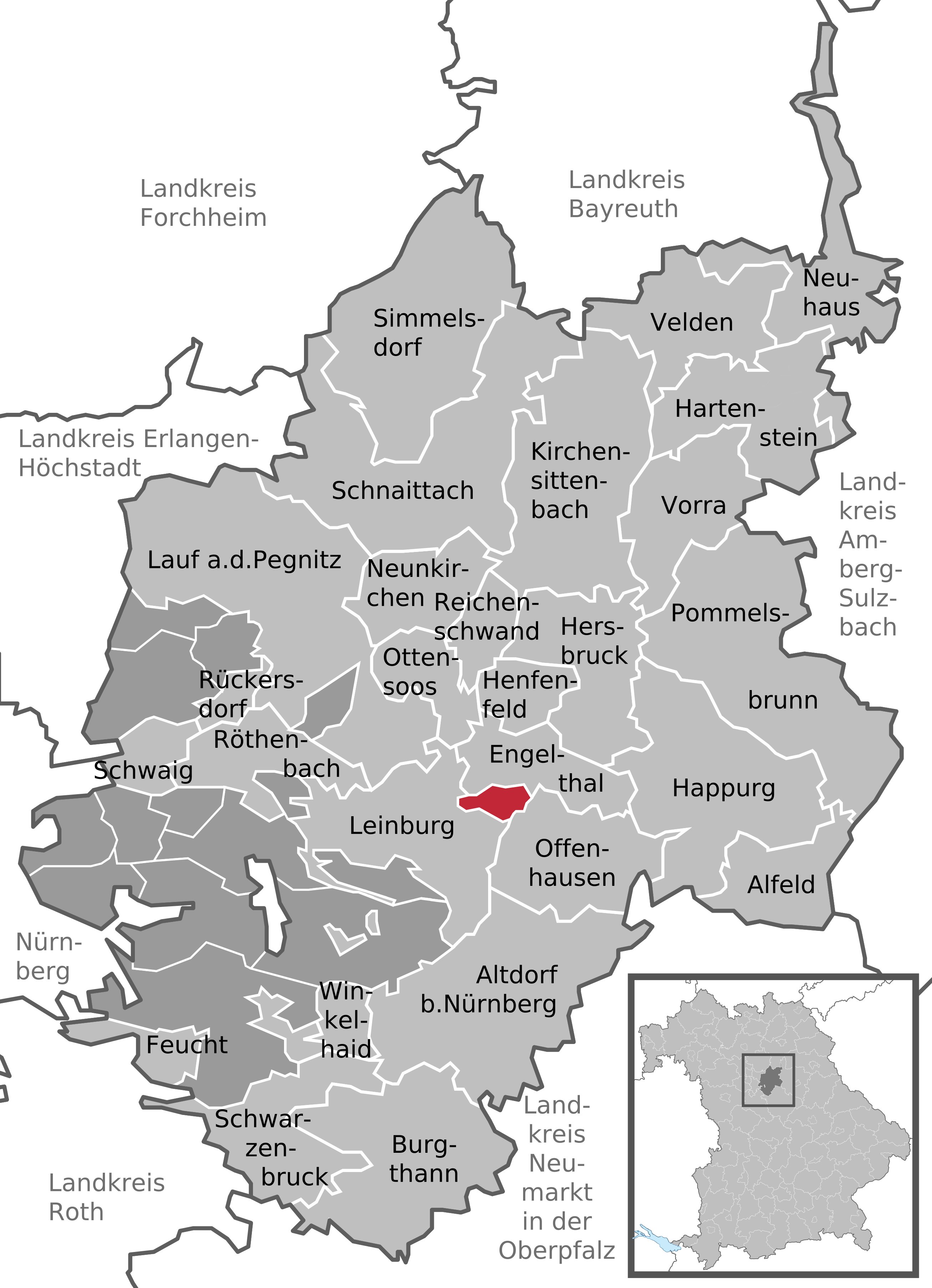 Positionskarte des gemeindefreien Gebietes Engelthaler Forst